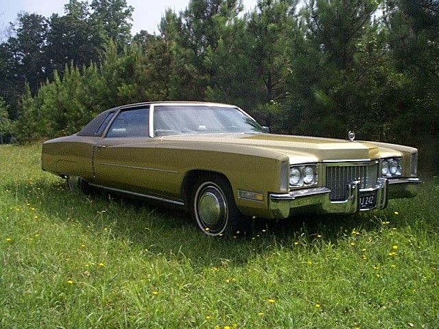 1972 Cadillac Eldorado hardtop